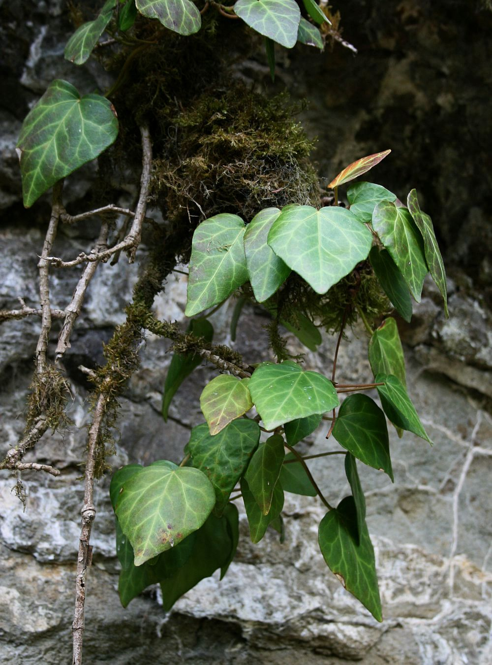 Hedera colchica, Araliengewächse (Araliaceae) – Georgien/საქართველო: Kleiner Kaukasus, ca. 3,5 km SE Akhaldaba/ახალდაბა, ca. 870 m s.m.